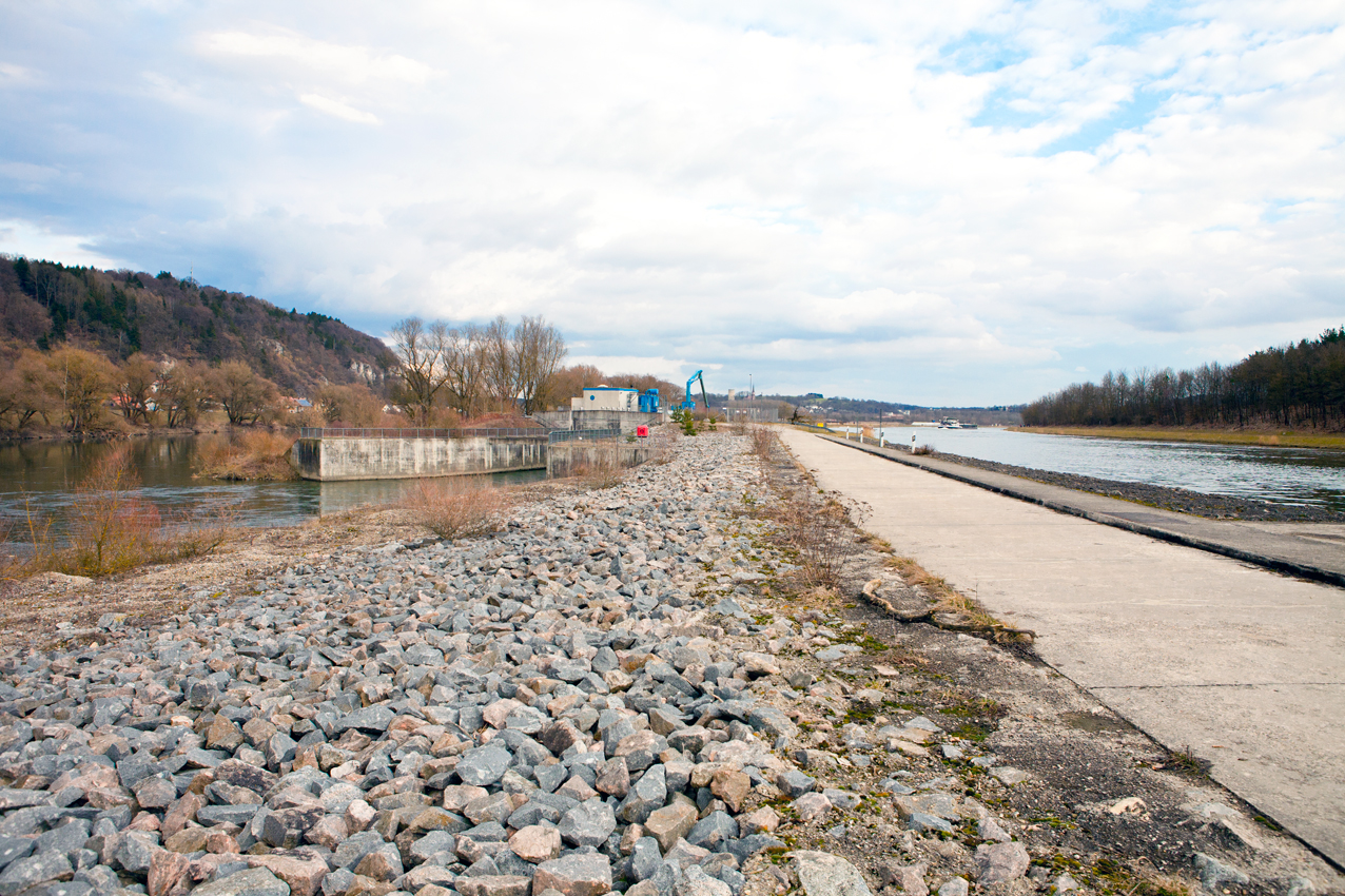 Blickrichtung: Ostsüdost (flussaufwärts) Linke Bildseite: Donau südlich von Oberndorf. Bildmitte: Das Bahnstromkraftwerk Bad Abbach. Die Betonmauern im linken Drittel der Fotografie markieren den Kanal für das abfließende Wasser (Unterwasser). Rechte Bildseite: Das höhere Niveau des Rhein-Main-Donau-Kanals bei Gundelshausen, befestigte Straße von der Schleuse Bad Abbach (Umgehungskanal) zum Bahnstromkraftwerk.